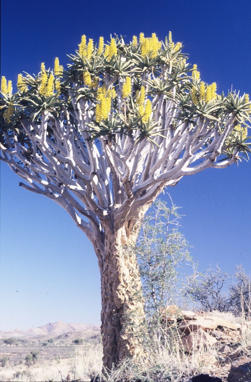 Aloe dichotoma tree in Namibia